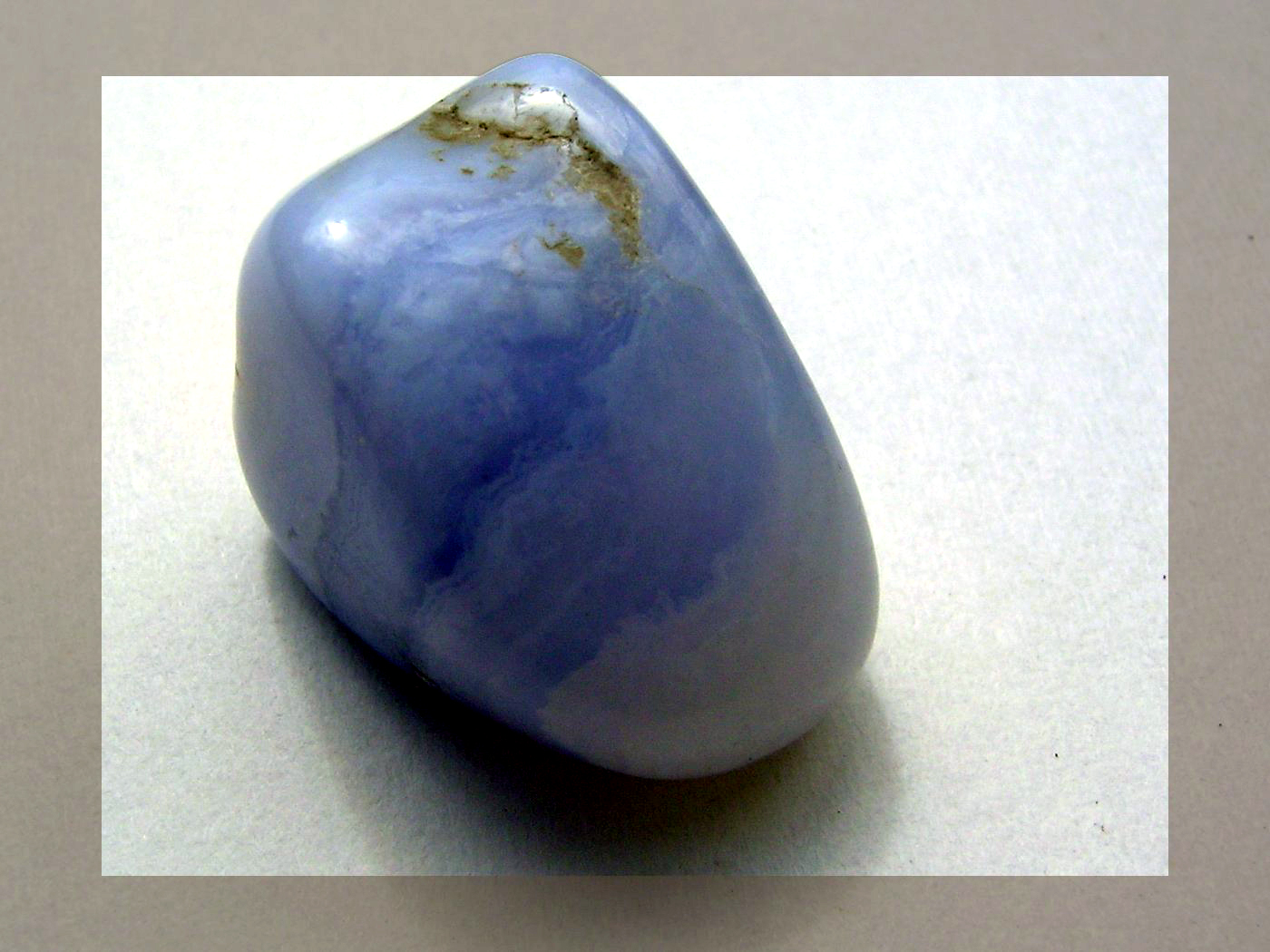 Chalcedon